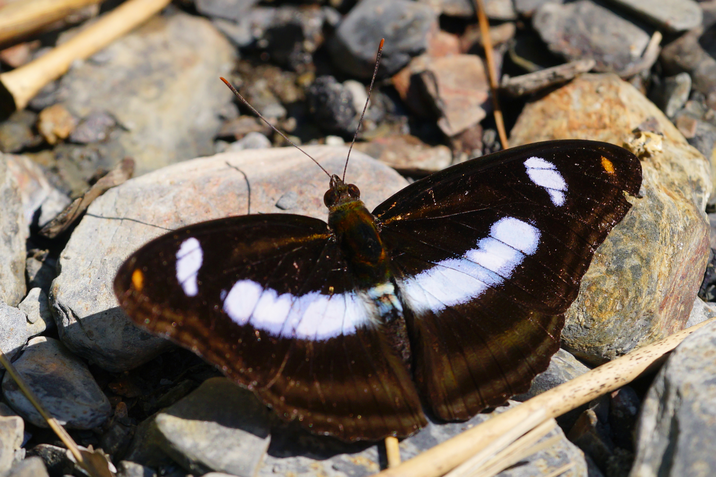 雙色帶蛺蝶 Athyma cama zoroastes